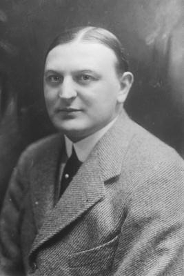 Ralph Benatzky (1884 - 1957), Česko-rakouský operetní skladatel.